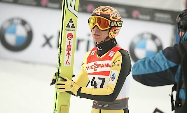 Noriaki Kasai podczas serii kwalifikacyjnej przed konkursem indywidualnym mężczyzn na skoczni normalnej na Mistrzostwach Świata w Narciarstwie Klasycznym 2011 w Oslo.